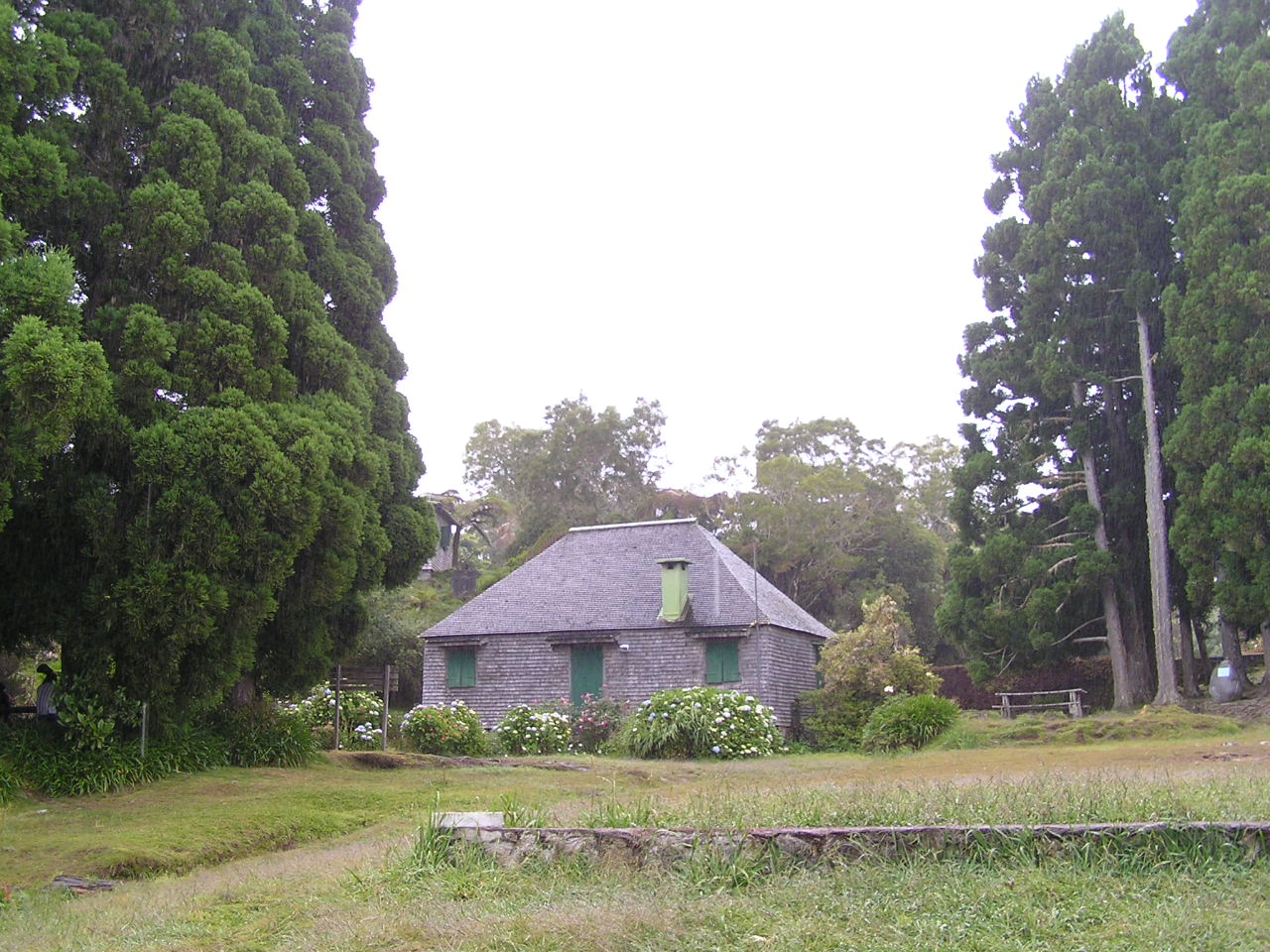 Gîte de Bélouve, à la Réunion